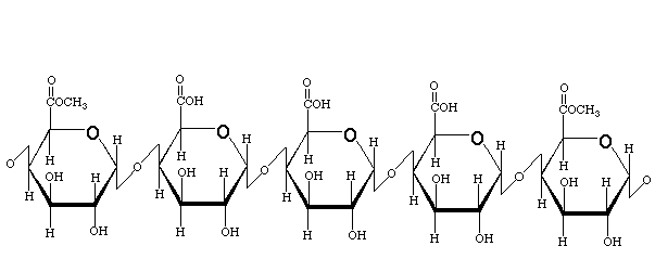 המבנה הכימי של פקטין.